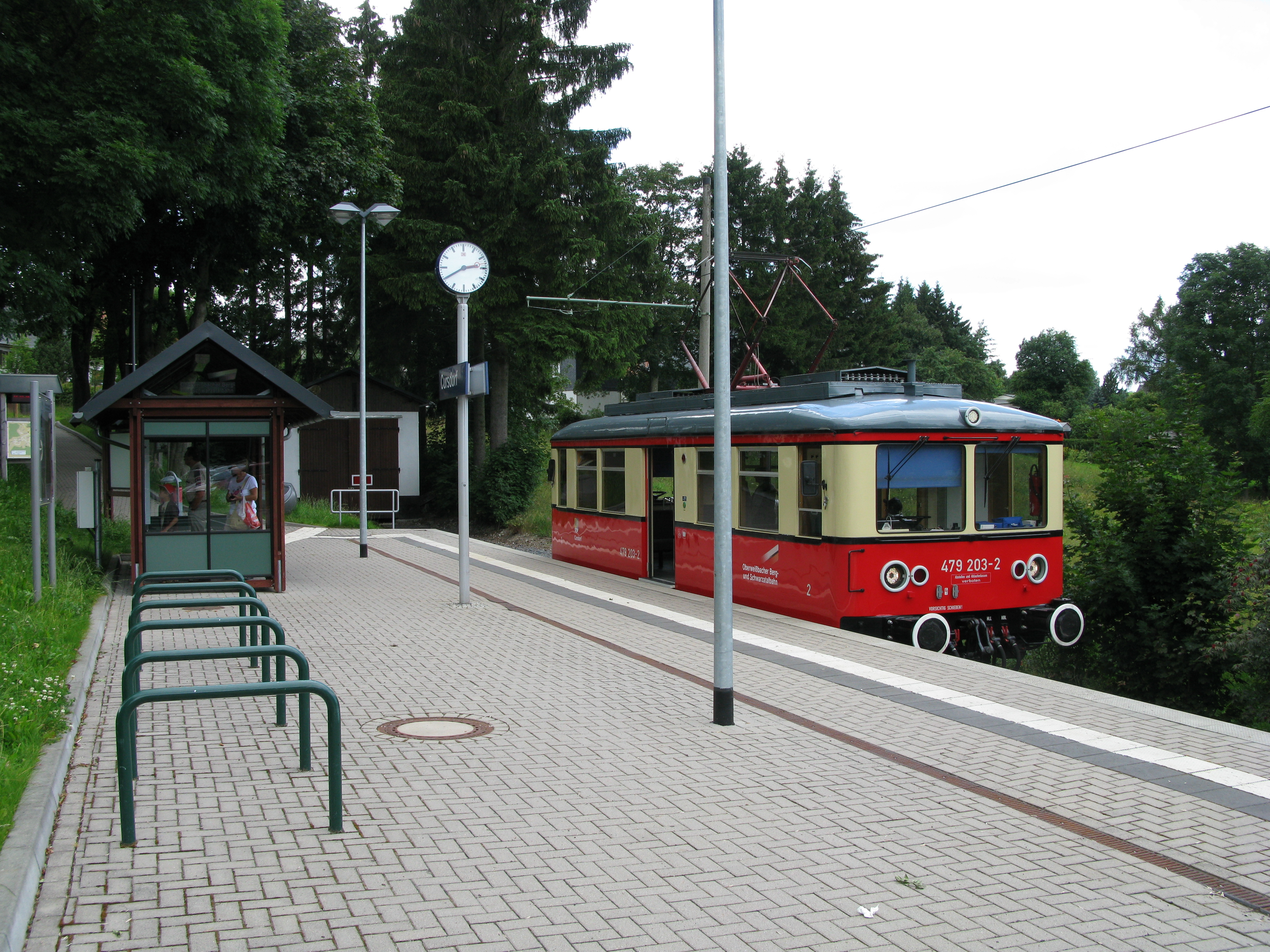 Endstation der Oberweißbacher Bergbahn in Cursdorf